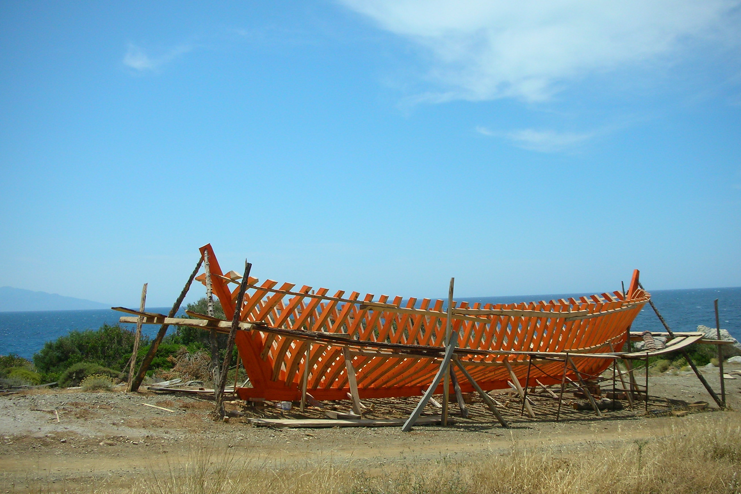 Samos, Agios Isidoros, Kaikiawerft